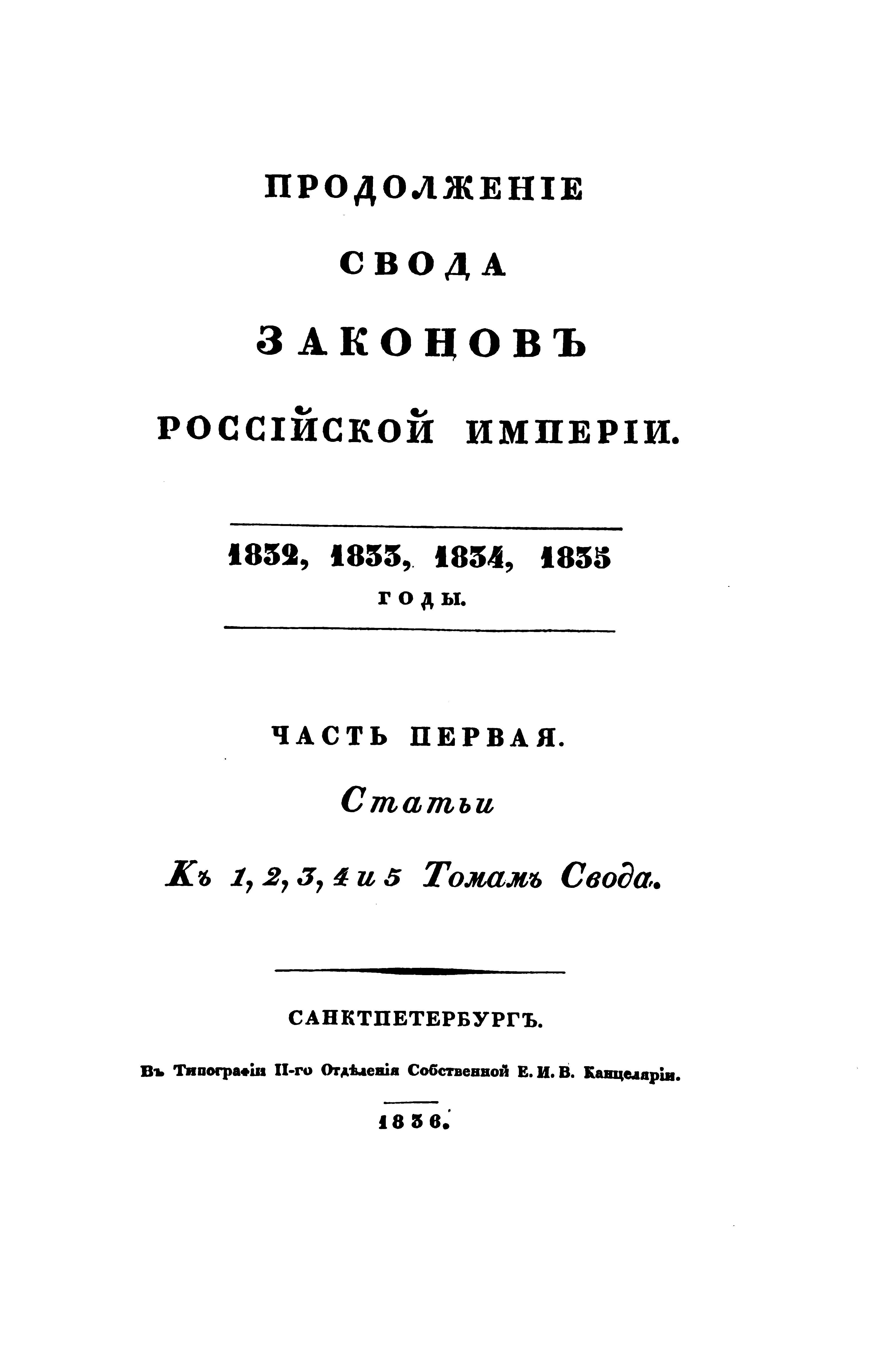 Продолжение Свода законов Российской империи.